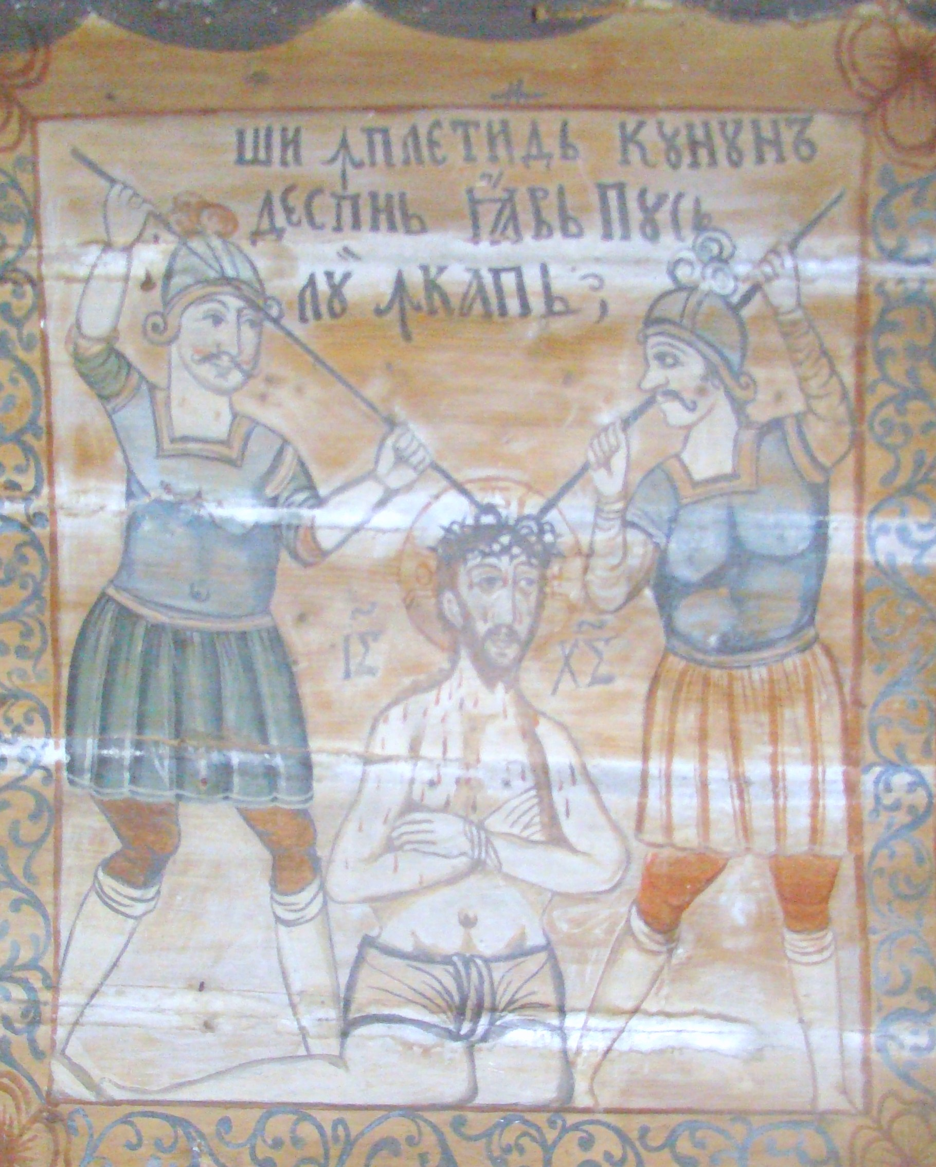 Biserica de lemn „Sfinții Arhangheli” din Băița, Mureș